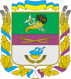 Прапор Балаклійського району